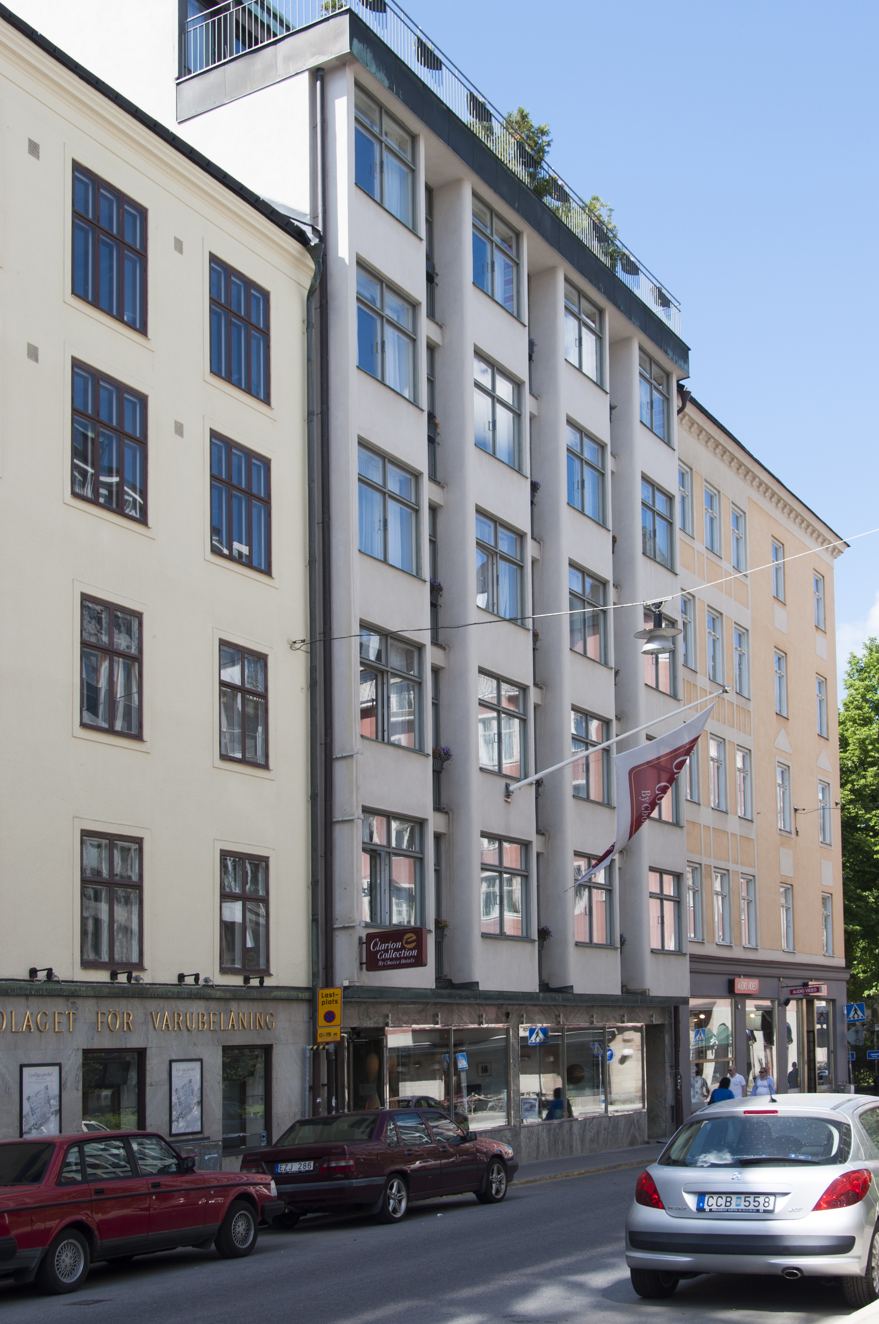 Havssvalget 15, Storgatan 6. Byggnadsår 1938-39, arkitekt Ernst Grönwall, byggherre E Lundholm & O Wennerstrand, byggmästare N Nessen.